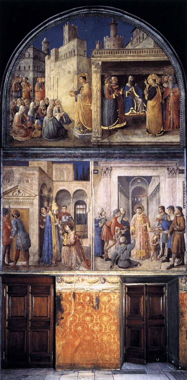 ANGELICO, Fra North wall of the chapel Fresco Cappella Niccolina, Palazzi Pontifici, Vatican